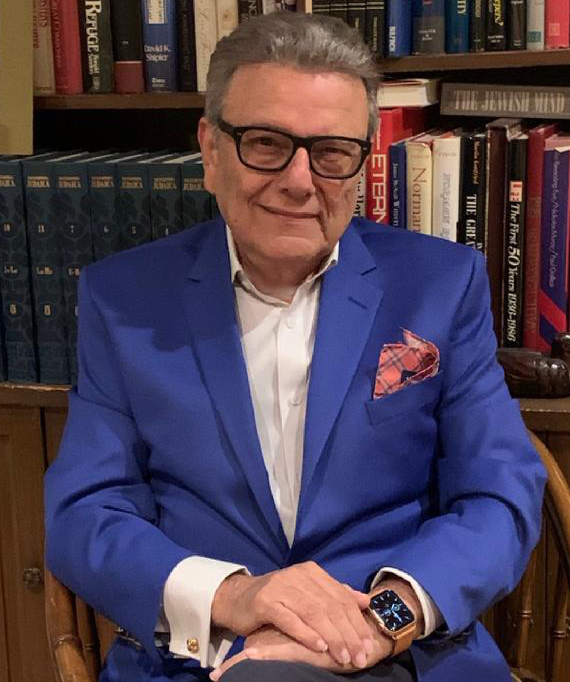 Eli Izhakoff in 2020.